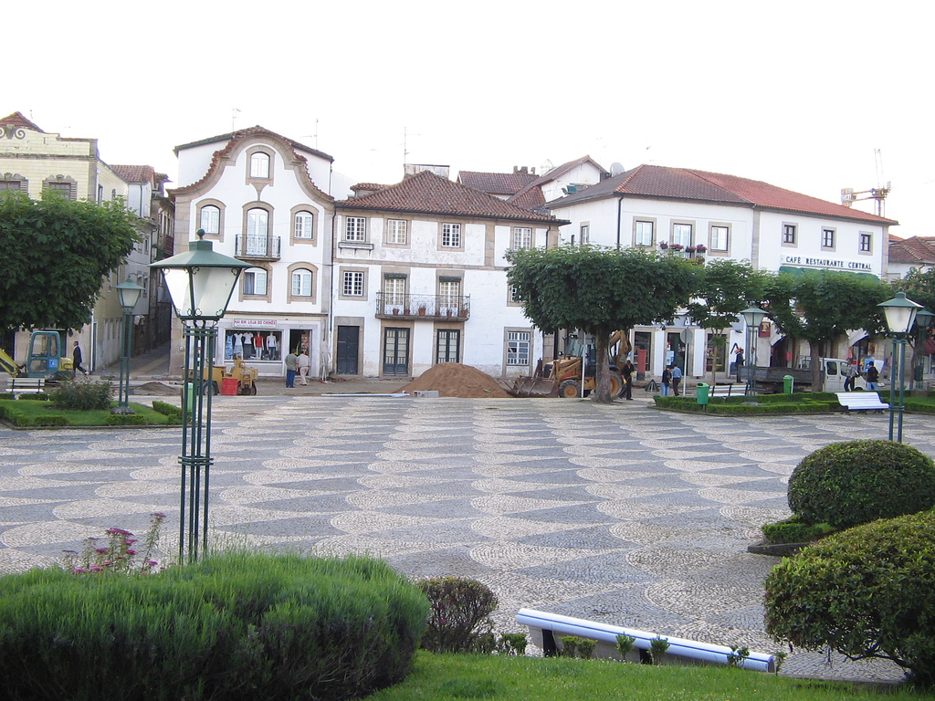 Monção